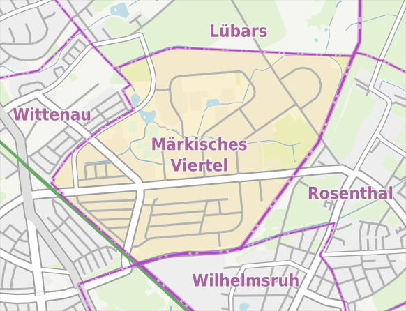 Übersichtskarte der Straßen und Ortslagen in Berlin-Märkisches Viertel